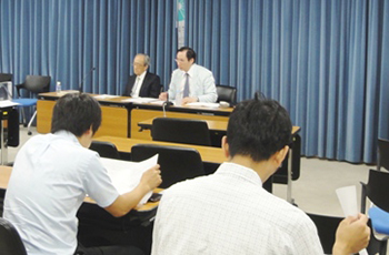 文部科学省にて記者会にて戴峰。